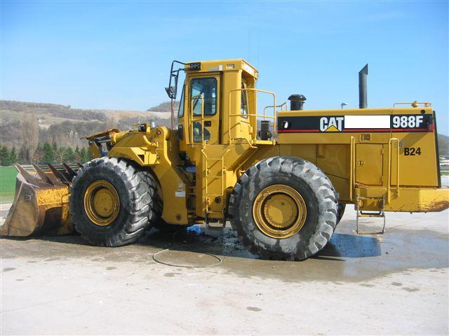 Caterpillar 988 F, schwerer Radlader